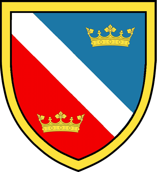 Vapensköld för adelsätten Ankarcrona